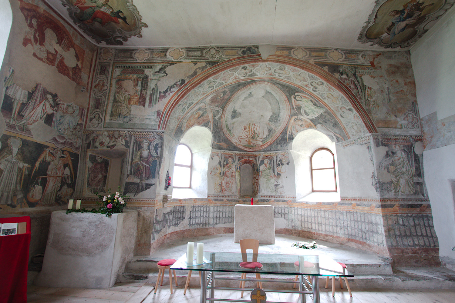 Kirche St. Johann in Prad am Stilfser Joch, Altarraum und Apsis mit Fresken